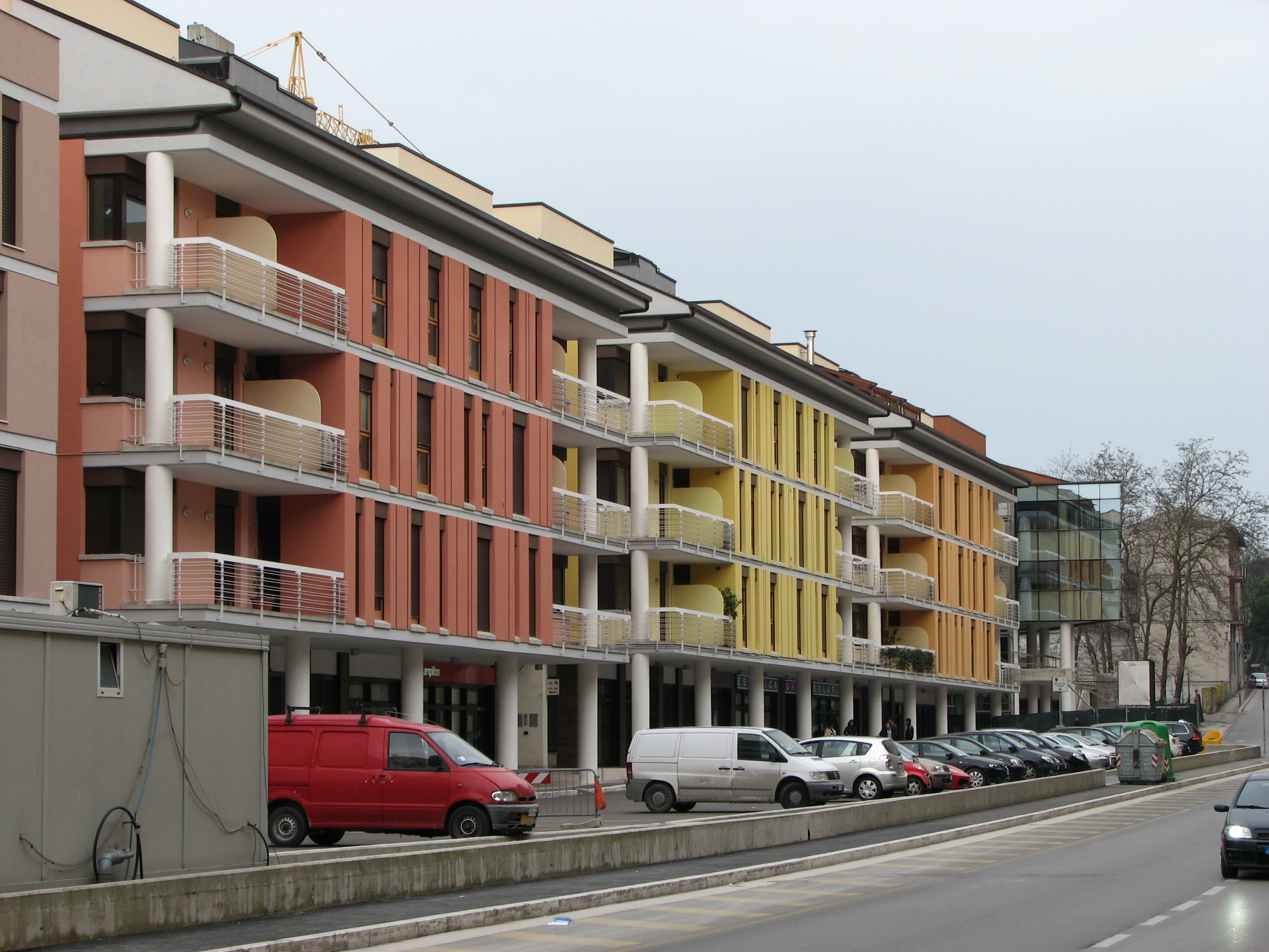 Via Trento, Macerata, Italy 2010